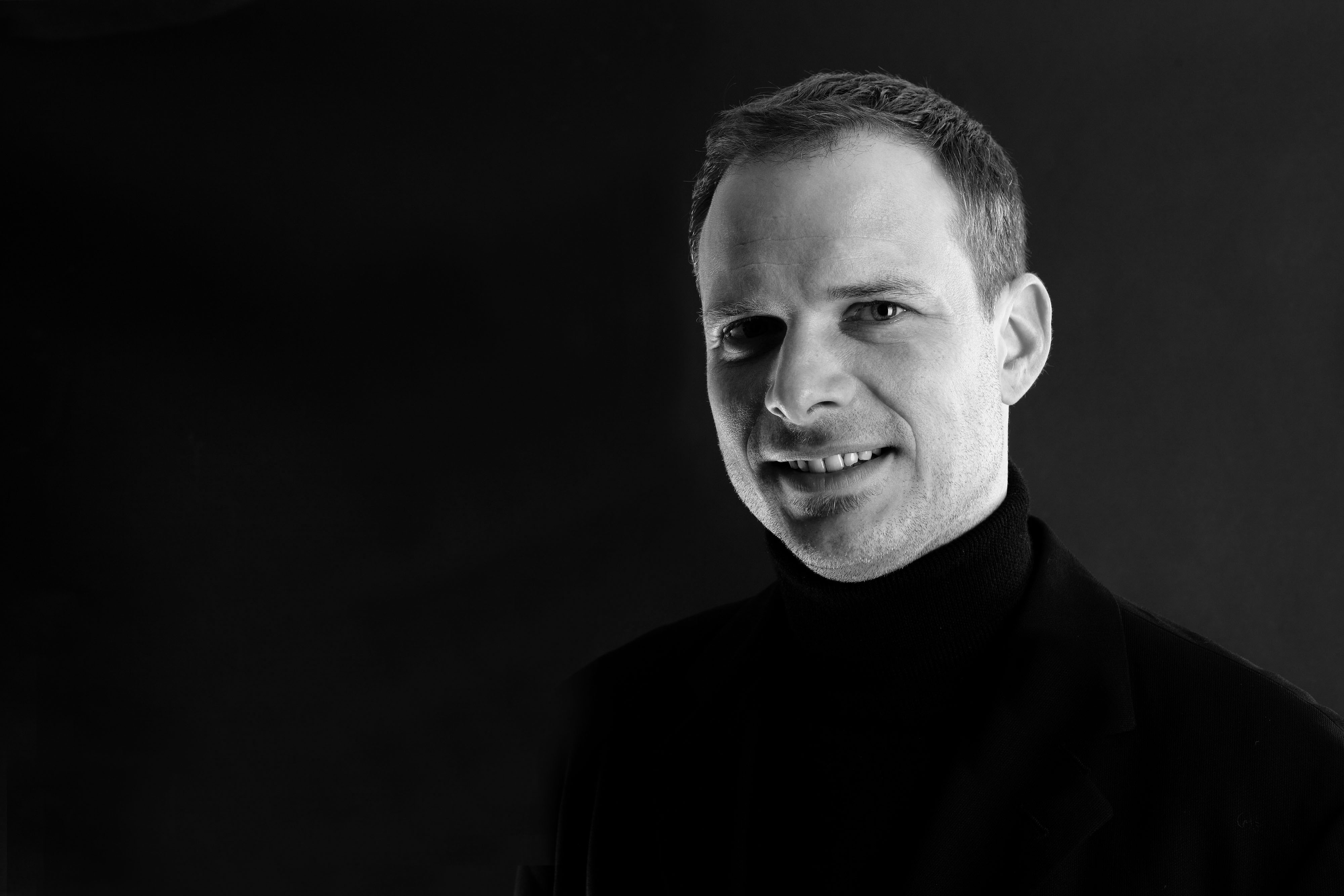 Nicolo Sokoli - Dirigent, Chorleiter und Organist